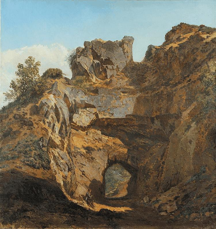 Tableau 1849 Paul Chevandier de Valdrome